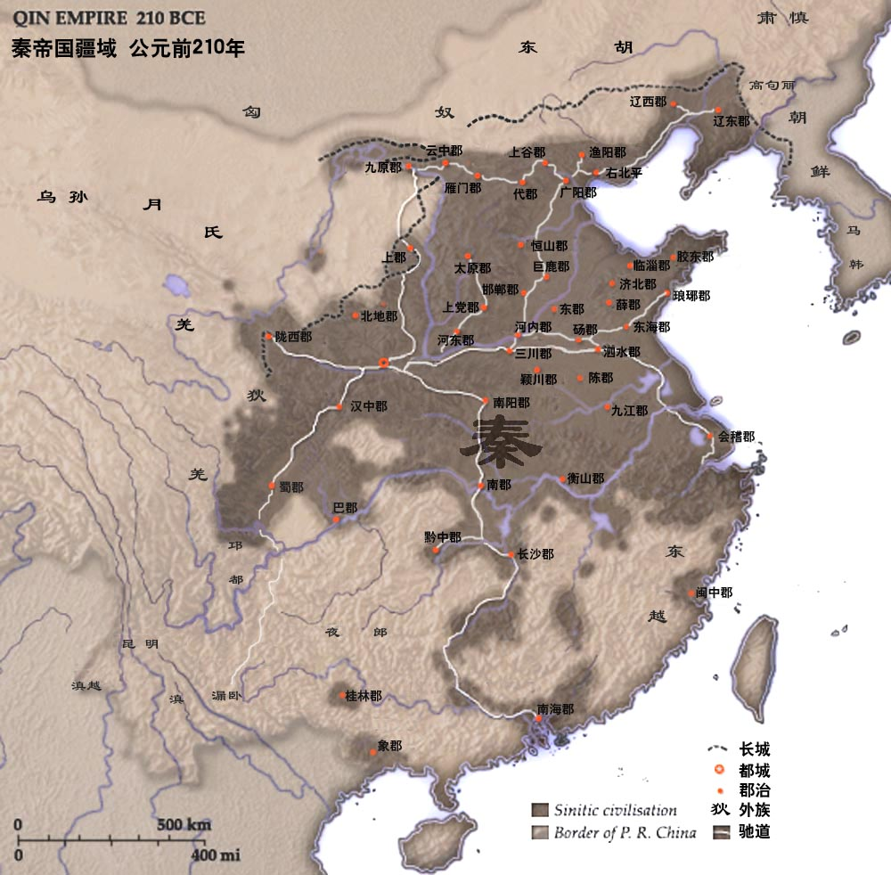 秦代疆域。